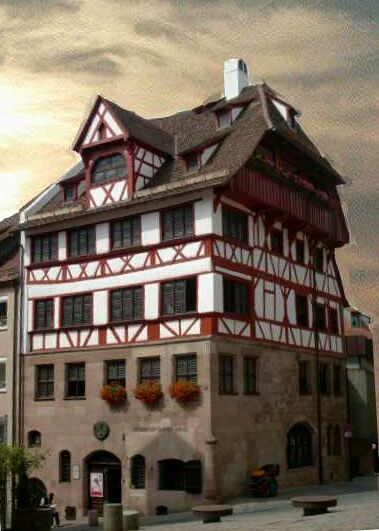 Dürerhaus in Nürnberg